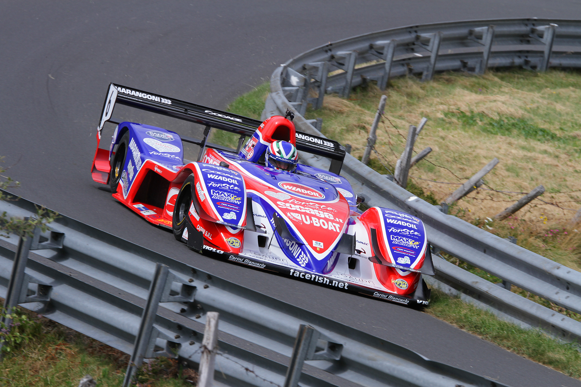 2012 - Osella FA30 Zytek - Simone Faggioli - Mont Dore